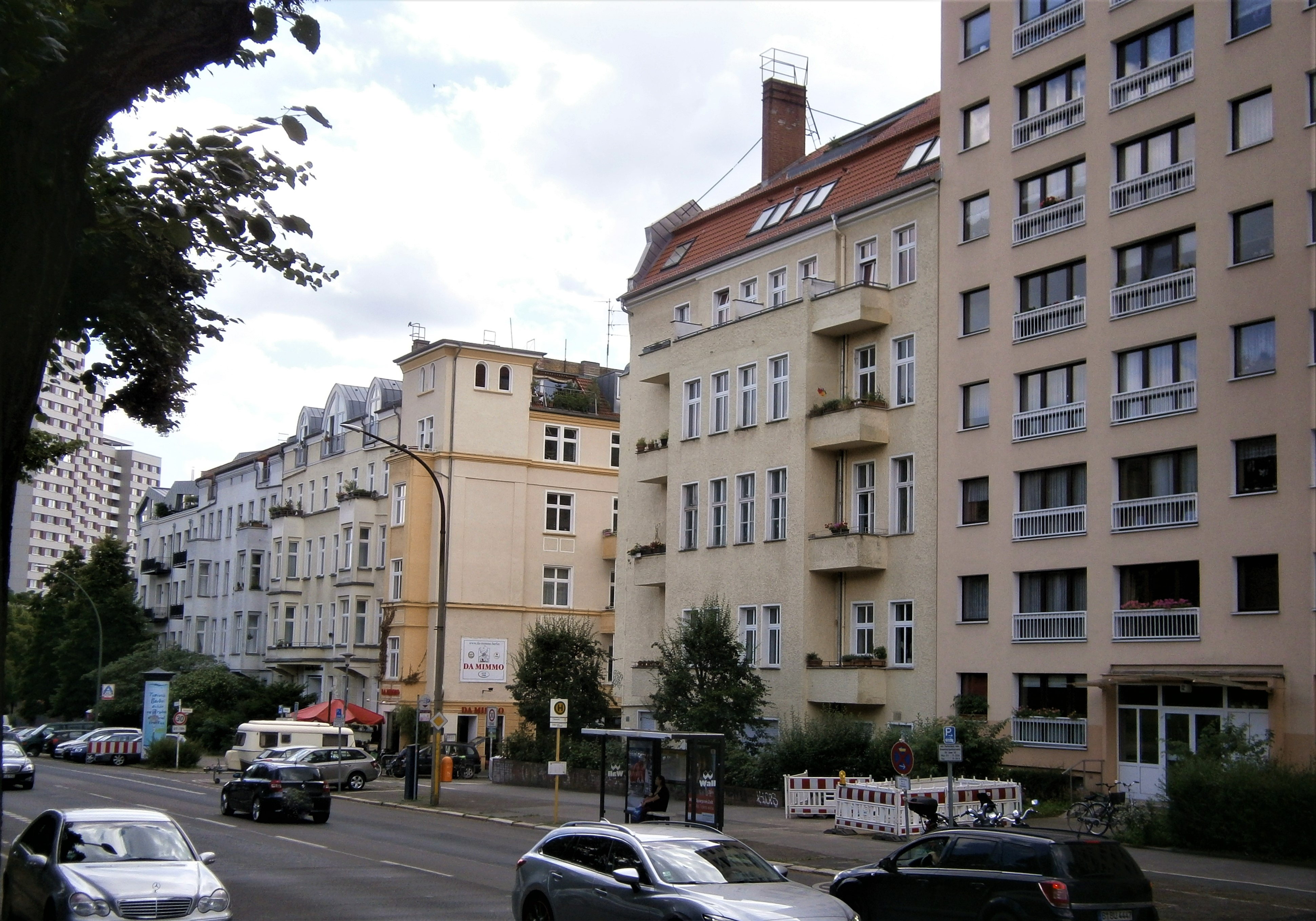 Die Friedenstraße ist eine Straße im Berliner Bezirk Friedrichshain-Kreuzberg, Ortsteil Friedrichshain. Angelegt und benannt wurde sie 1871-1876 auf dem Communicationsweg außerhalb der abgerissenen Berliner Zollmauer. Bereits seit dem Anlegen und der Bebauung bestand eine Teilung der Straße auf Königstadt und Stralauer Viertel. Aktuell sind es drei unterschiedene Straßenabschnitte: regionale Straßenverbindung im Barnimkiez am Volkspark Friedrichshain, am Platz der Vereinten Nationen als Parkzone, südlich im (Planungsraum) "Friedenstraße" als Ergänzungsstraße. Das Bild zeigt den Blick vom Randweg am Friedrichshain auf die Mündung Büschingstraße auf die Friedenstraße.